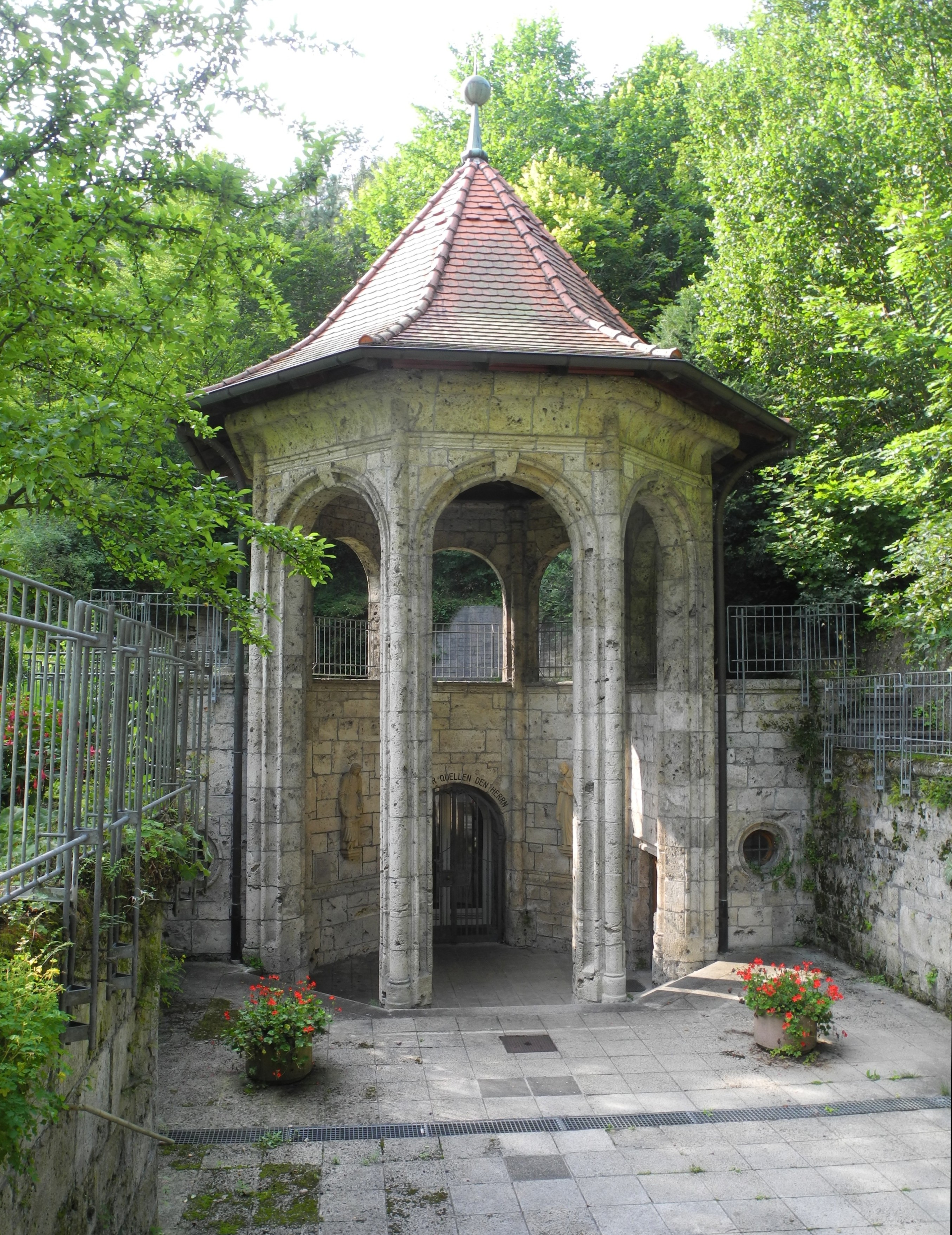 Bad Ditzenbach - Brunnenhaus.JPG